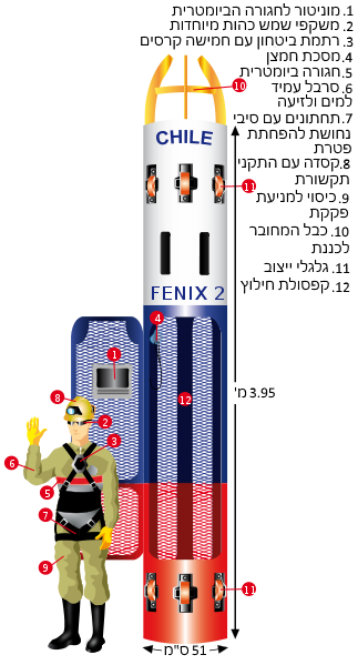 תרשים עברי של קפסולות פניקס